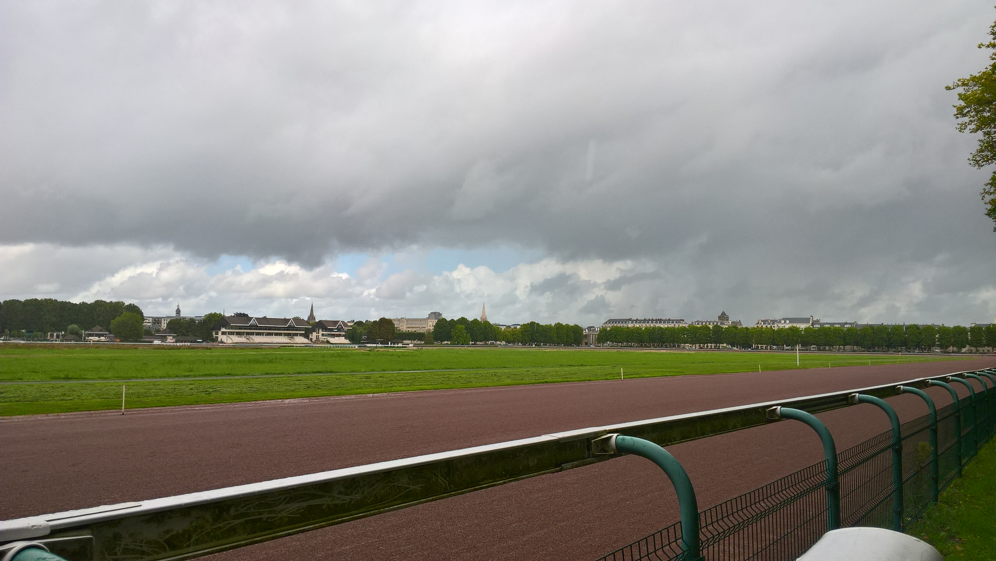 Piste de l'hippodrome de Caen avec la tribune en fond